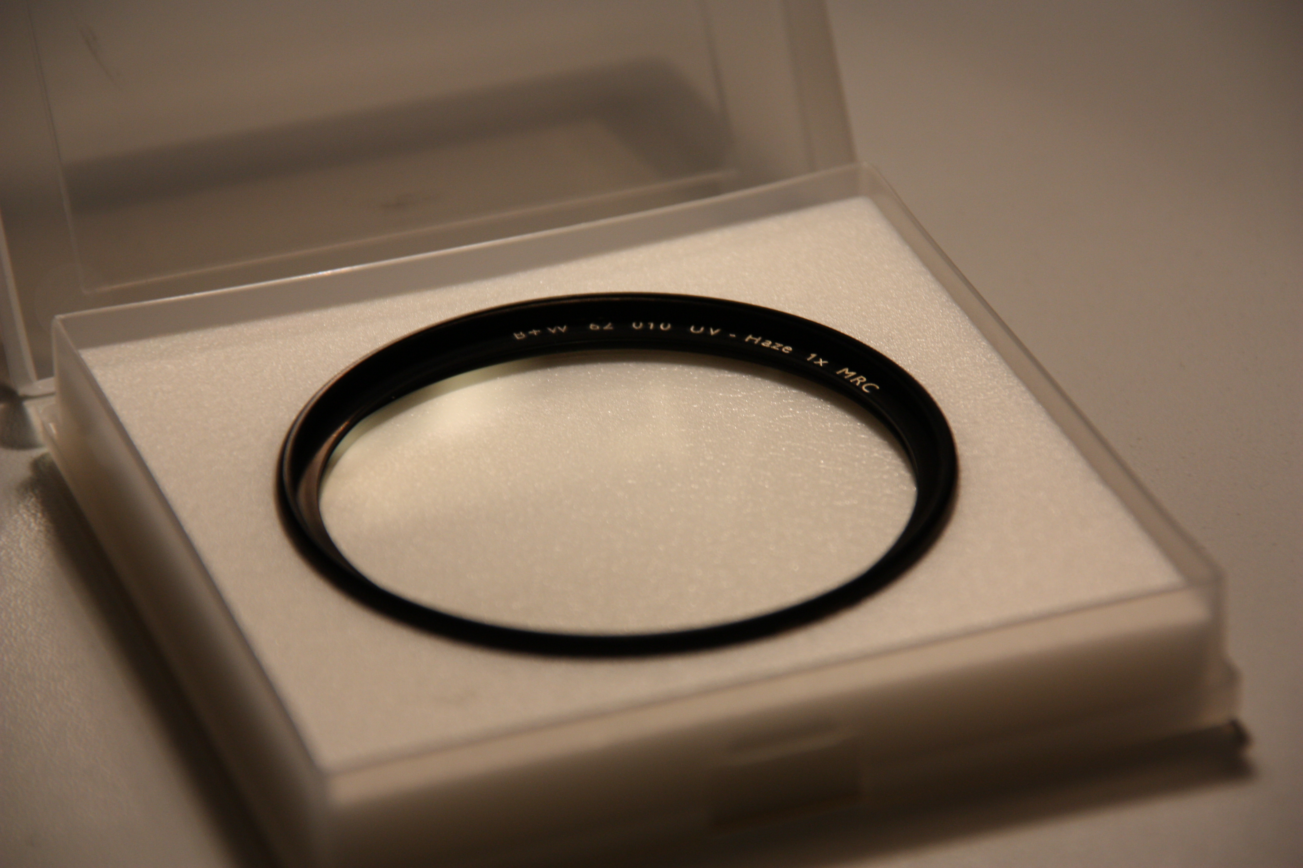 B+W (Schneider Kreuznach) UV-Filter 62mm mit MRC-Vergütung, daher kaum Spiegelung zu sehen